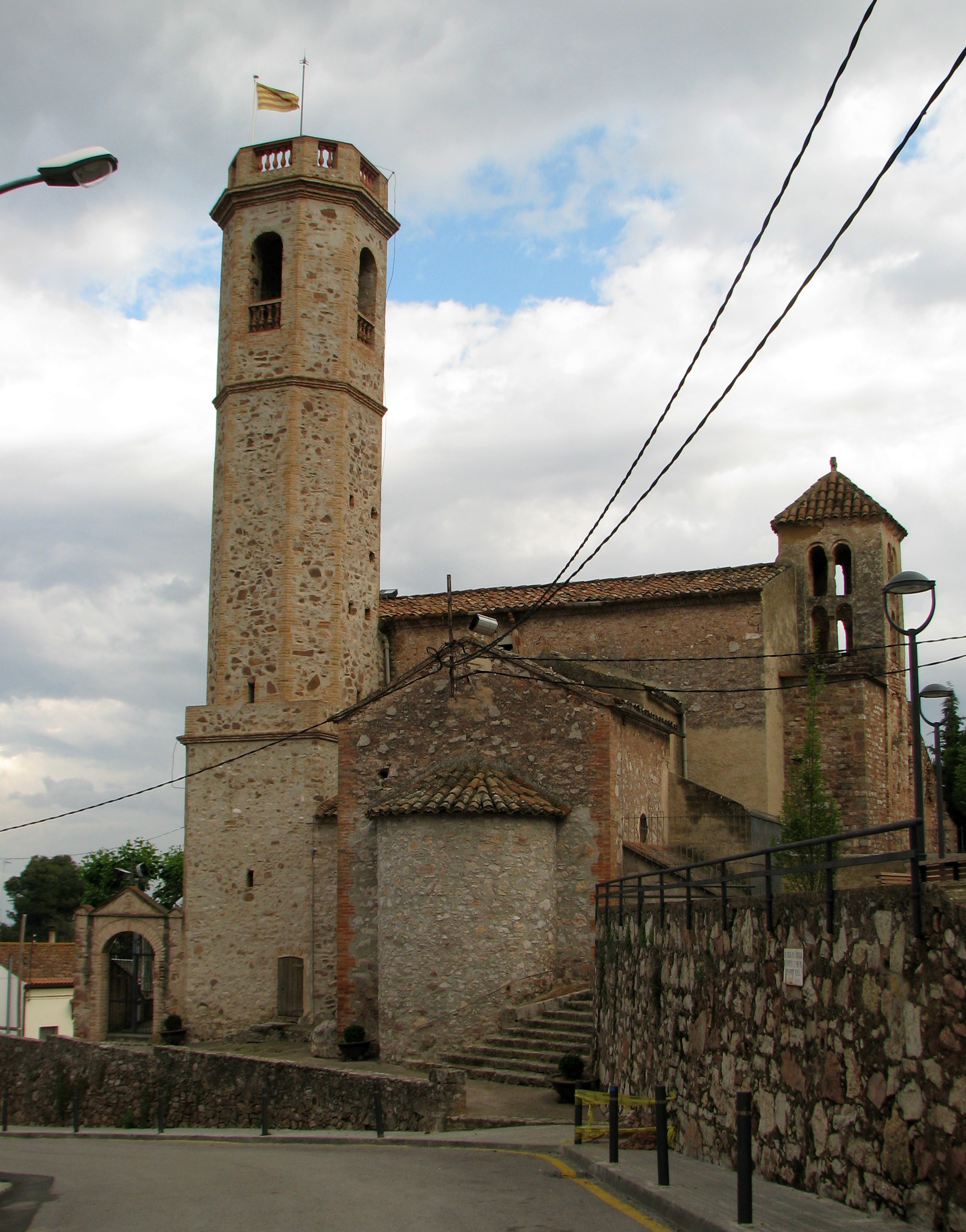 Esglèsia de Sant Feliu del Racó, Castellar del Vallès, provincia de Barcelona, Espanya.